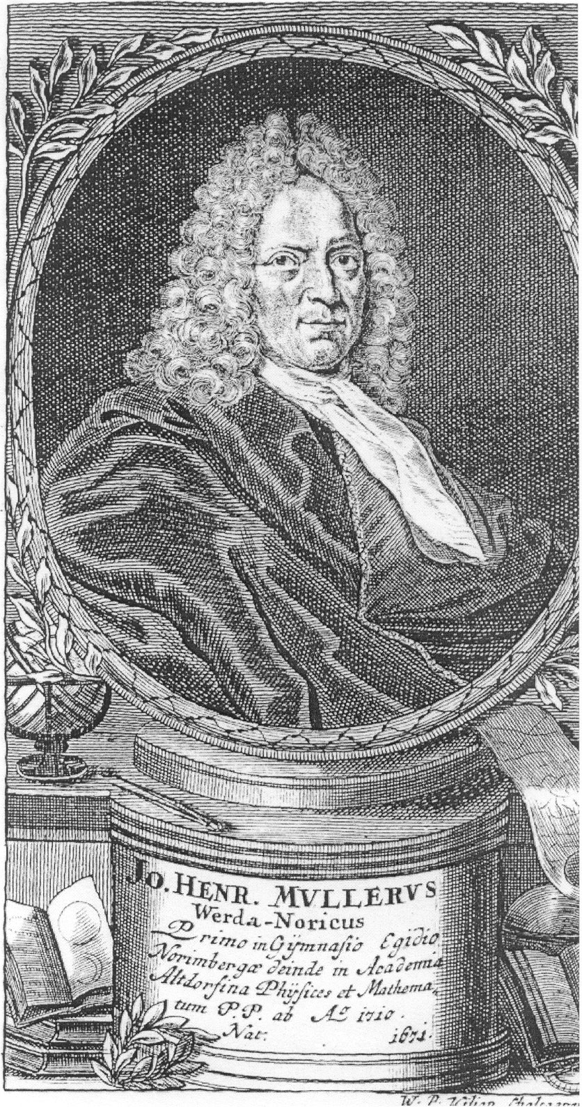 Jan Jindřich Müller starší bratr Jana Kryštofa Müllera